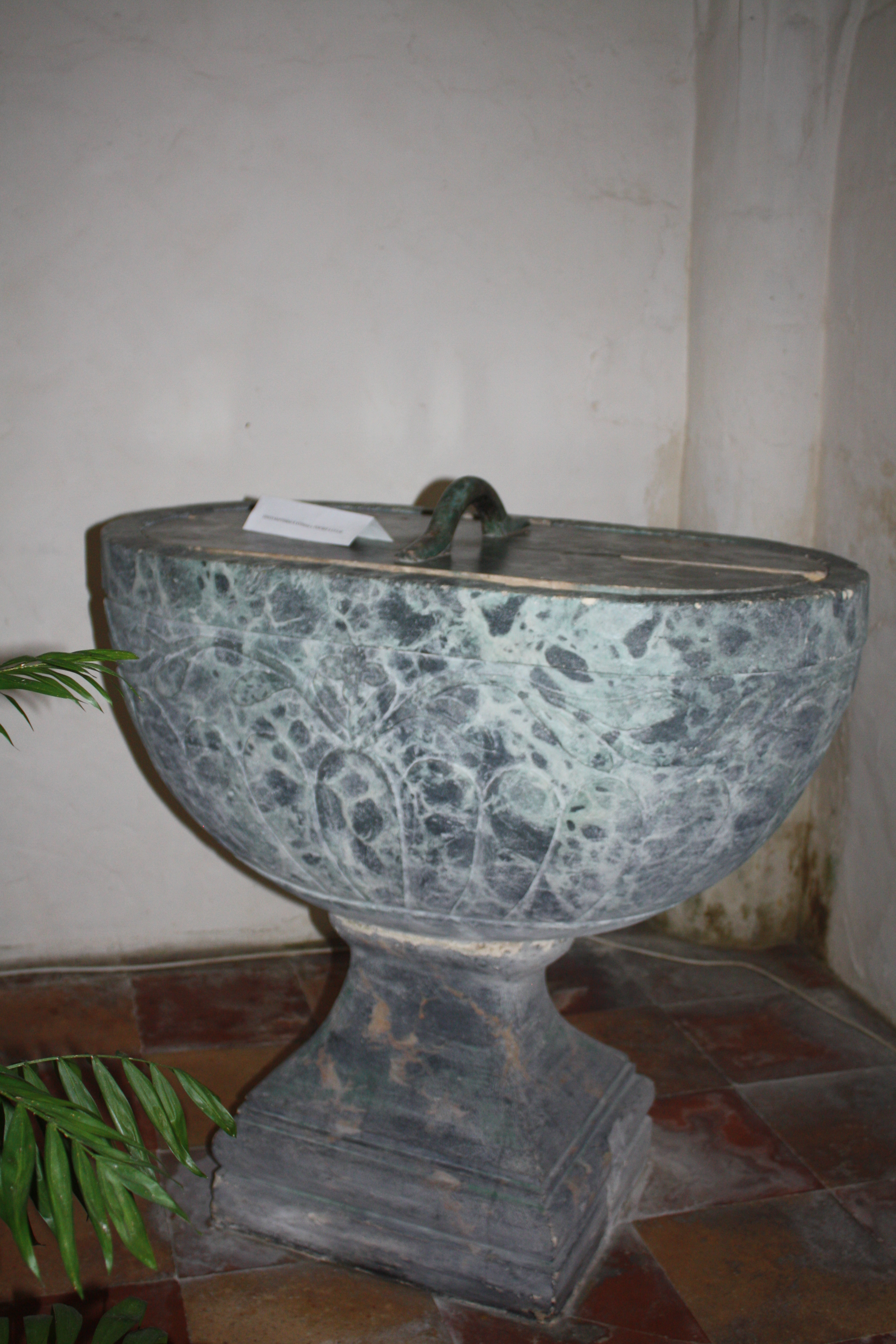 Église Saint-Germain de Saint-Germain-de-Vibrac